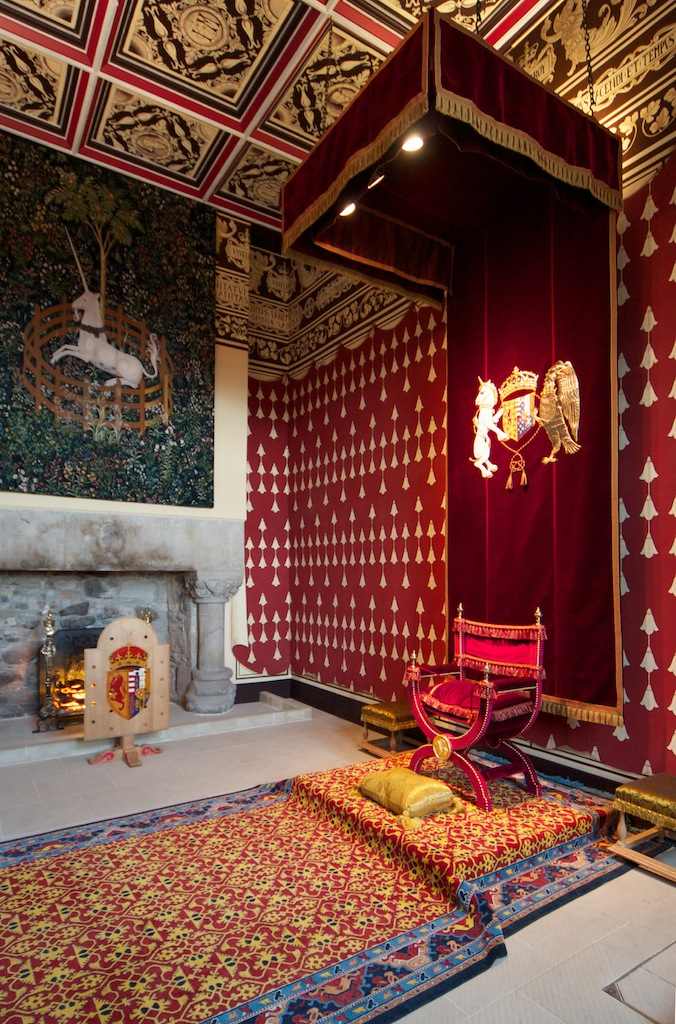 Queen's Inner Hall